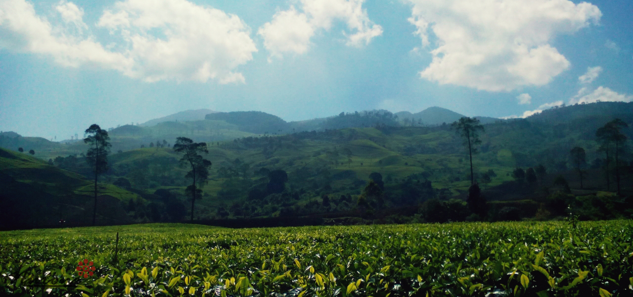 Rancabali Bandung